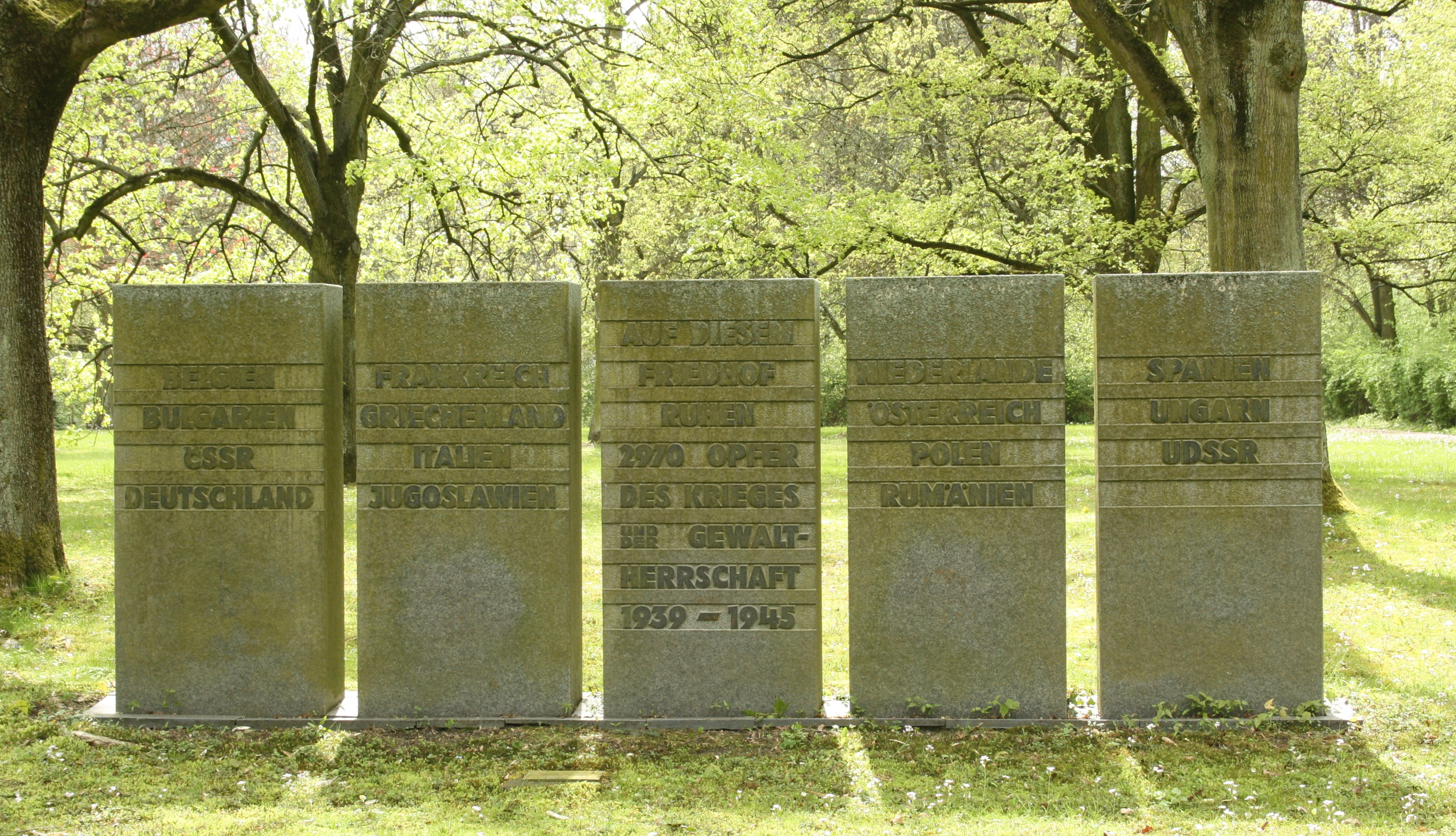 Salzgitter-Lebenstedt, Friedhof Jammertal, Gedenksteine